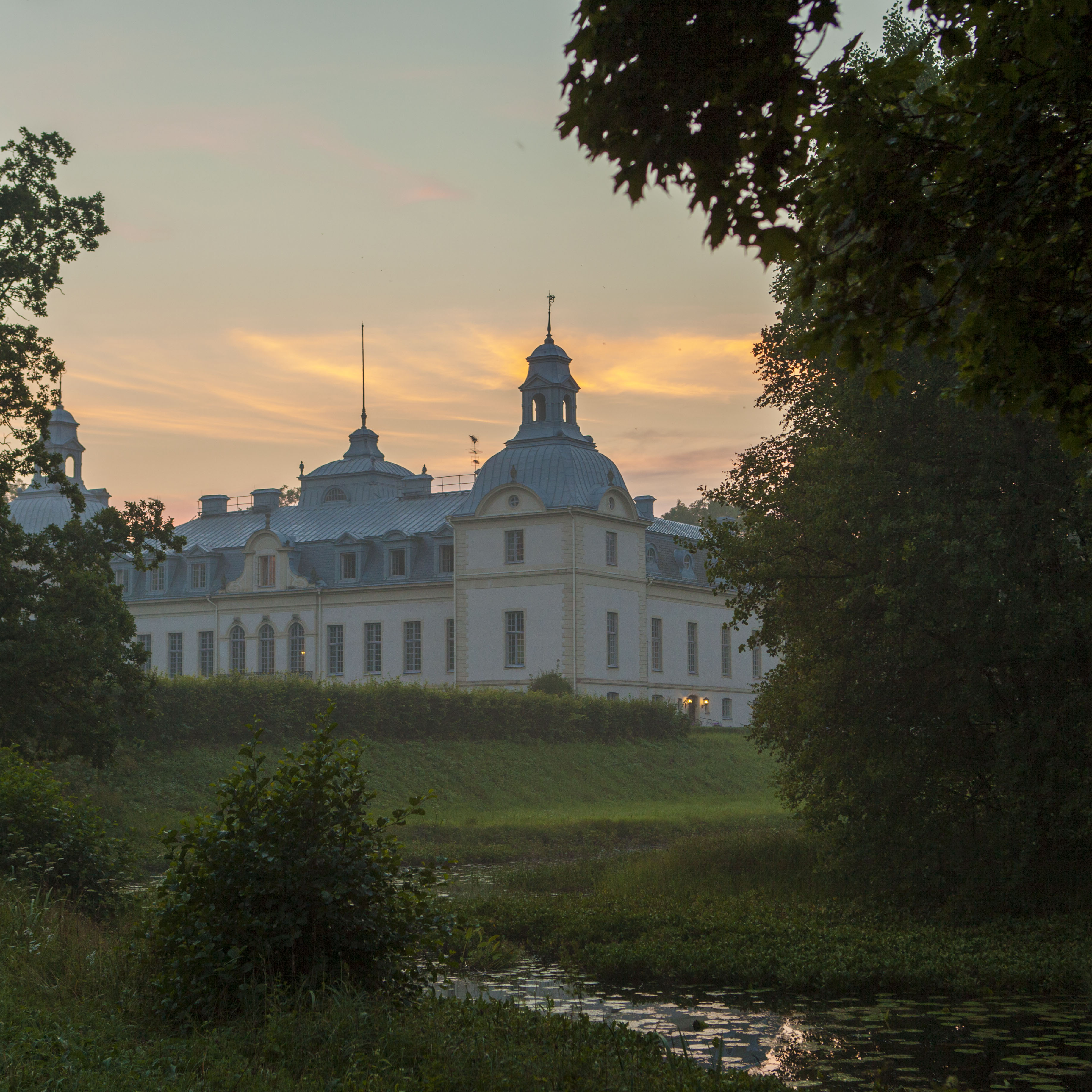 Kronovalls slott utanför Tomelilla